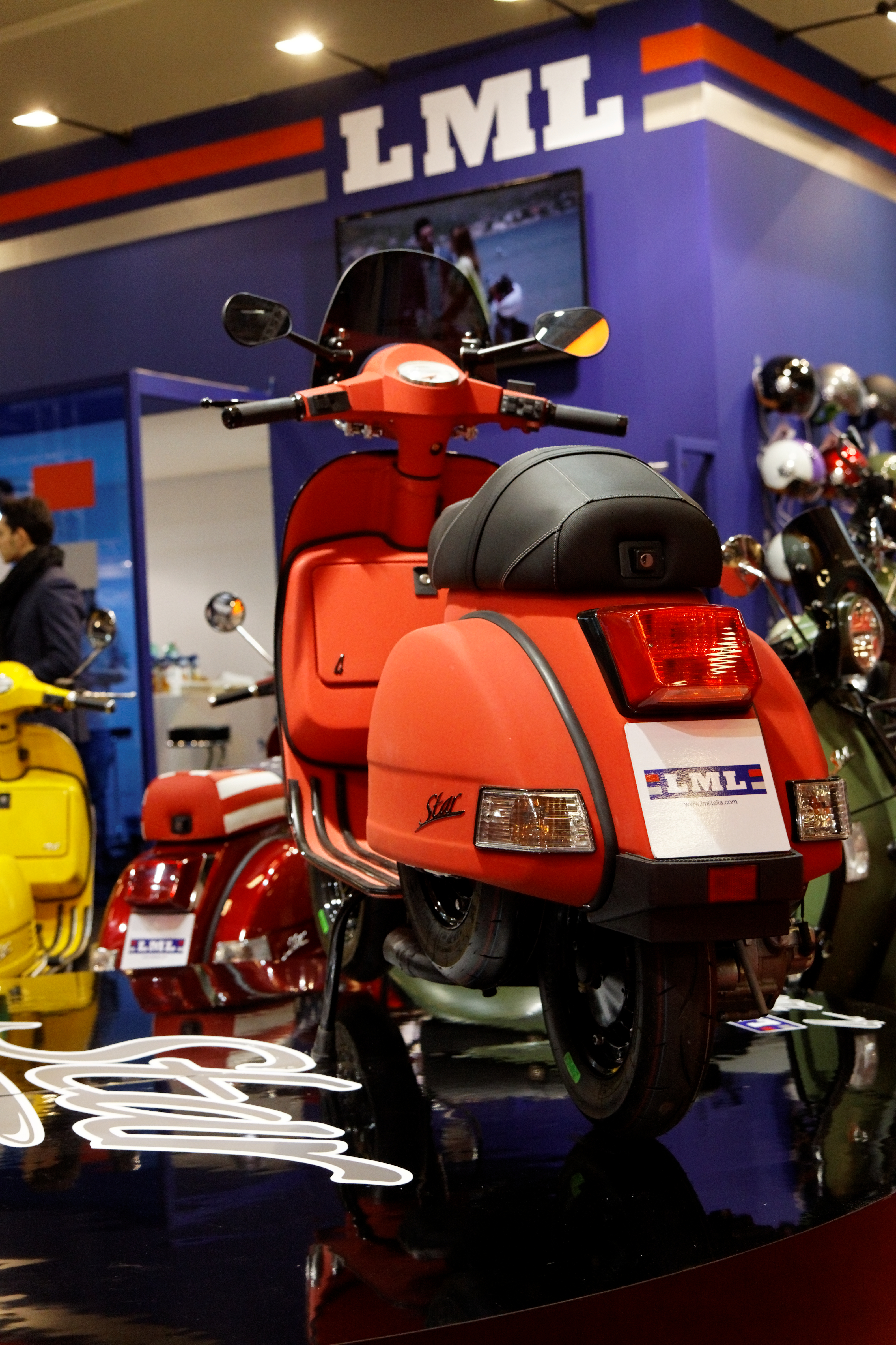 LML - Star 4